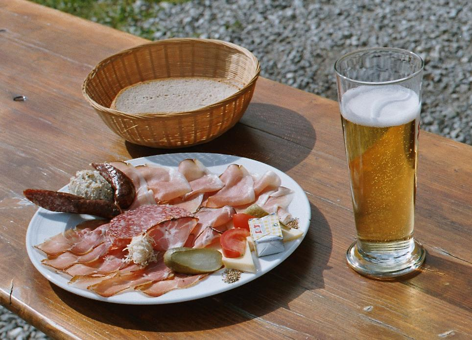 Jause (Snack, in Austria)